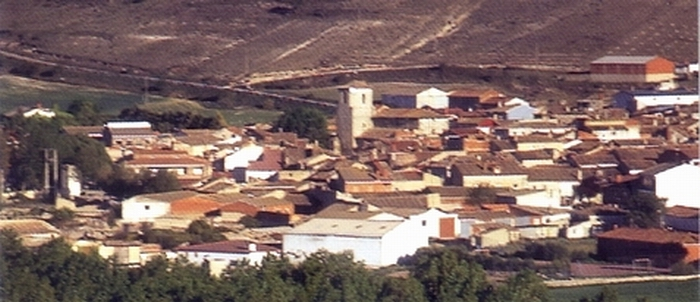 vista de Cevico Navero